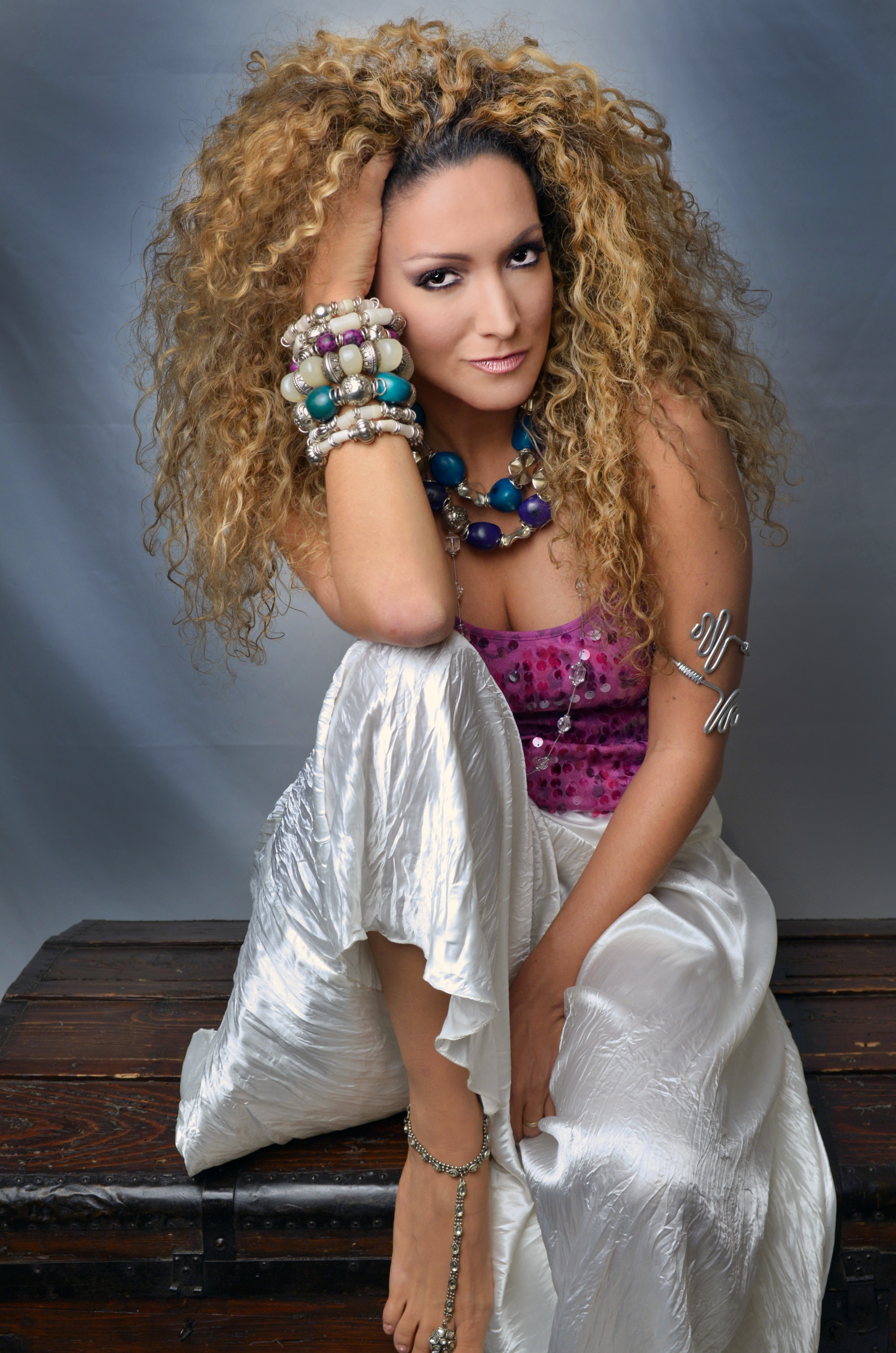 Erika Ender. Cantante, Compositora, Actriz, Productora de TV